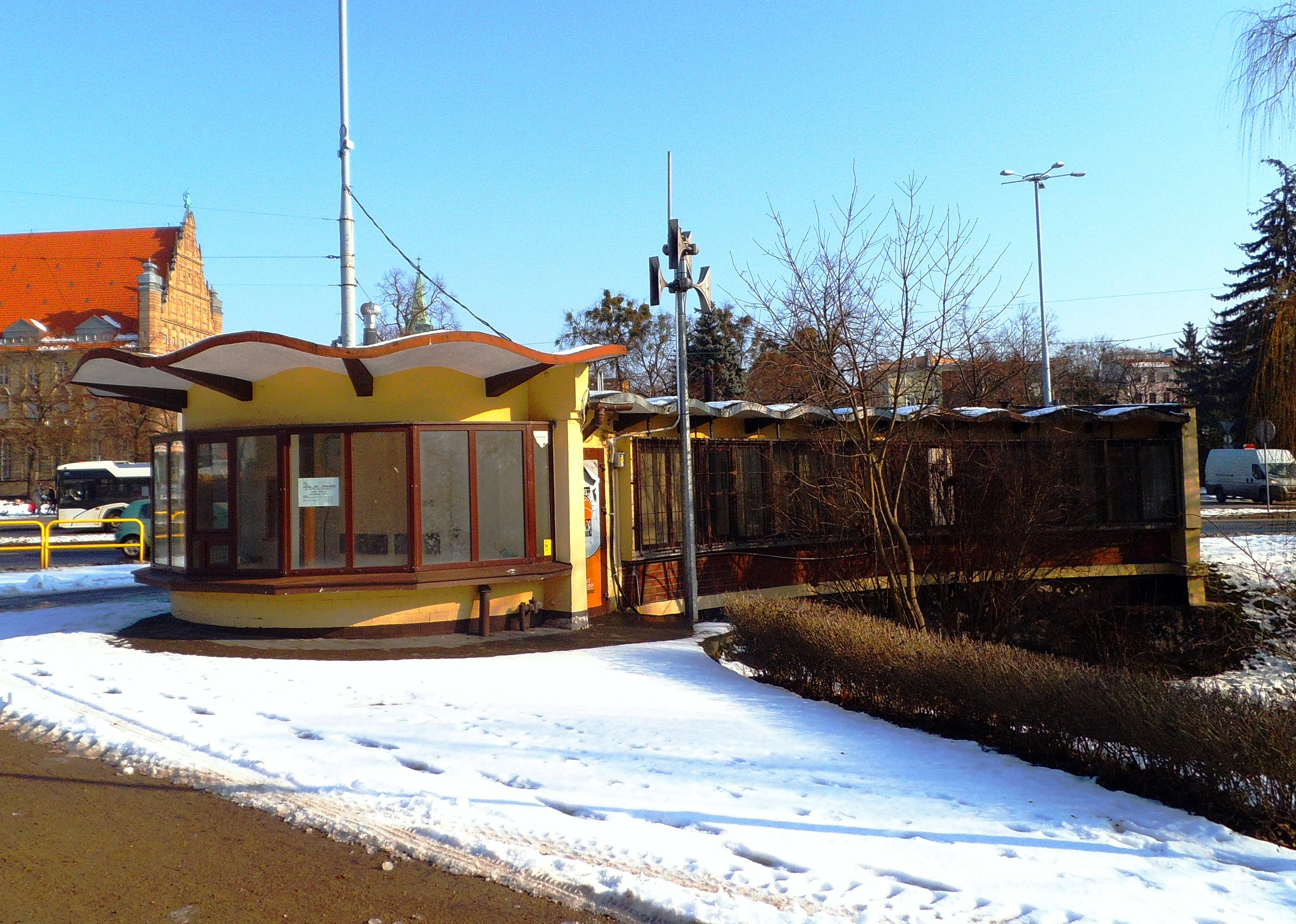 Pawilon MZK w Toruniu1